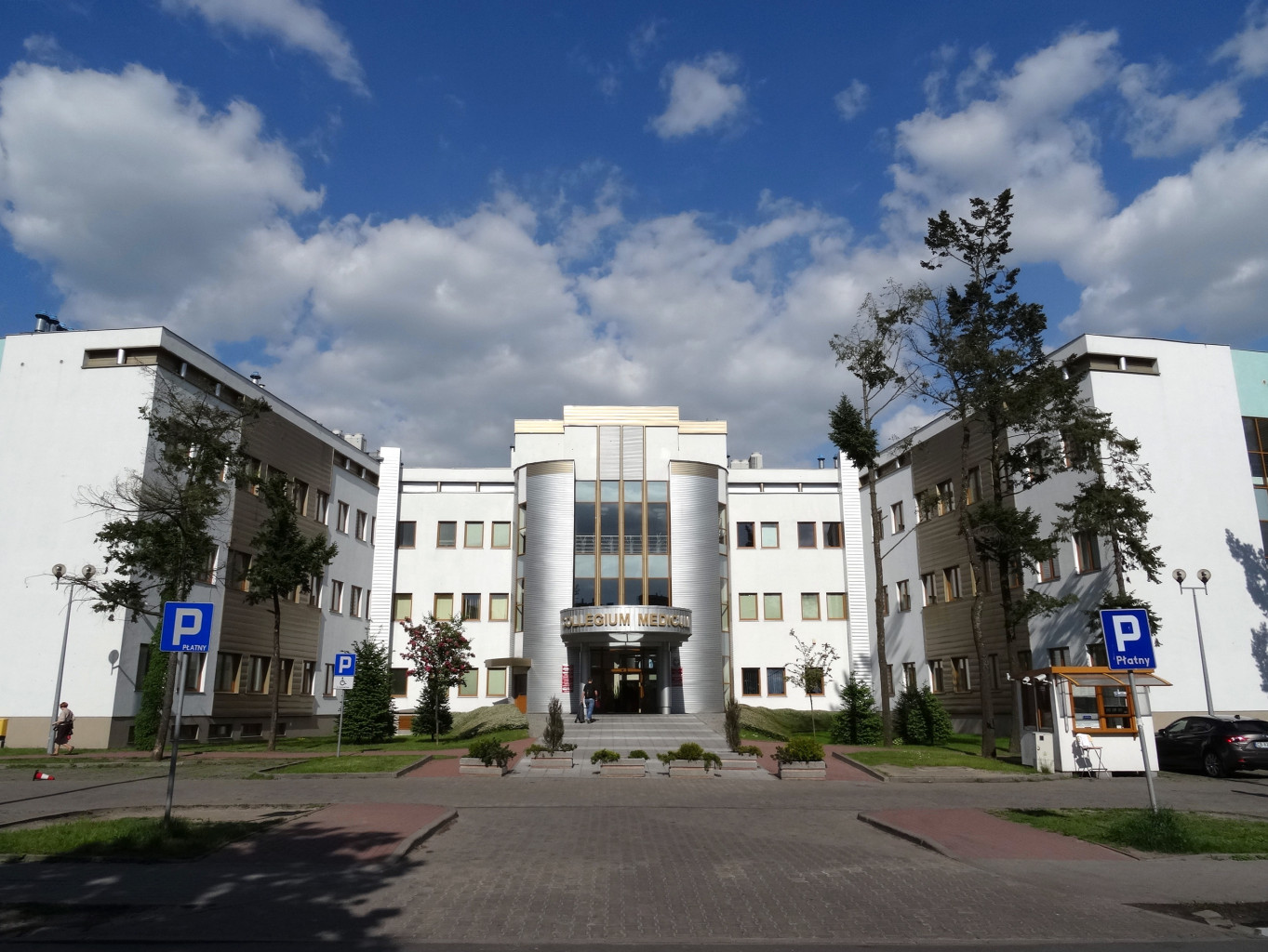 Wydział Farmacji Collegium Medicum Uniwersytetu Mikołaja Kopernika przy ul. Jurasza w Bydgoszczy